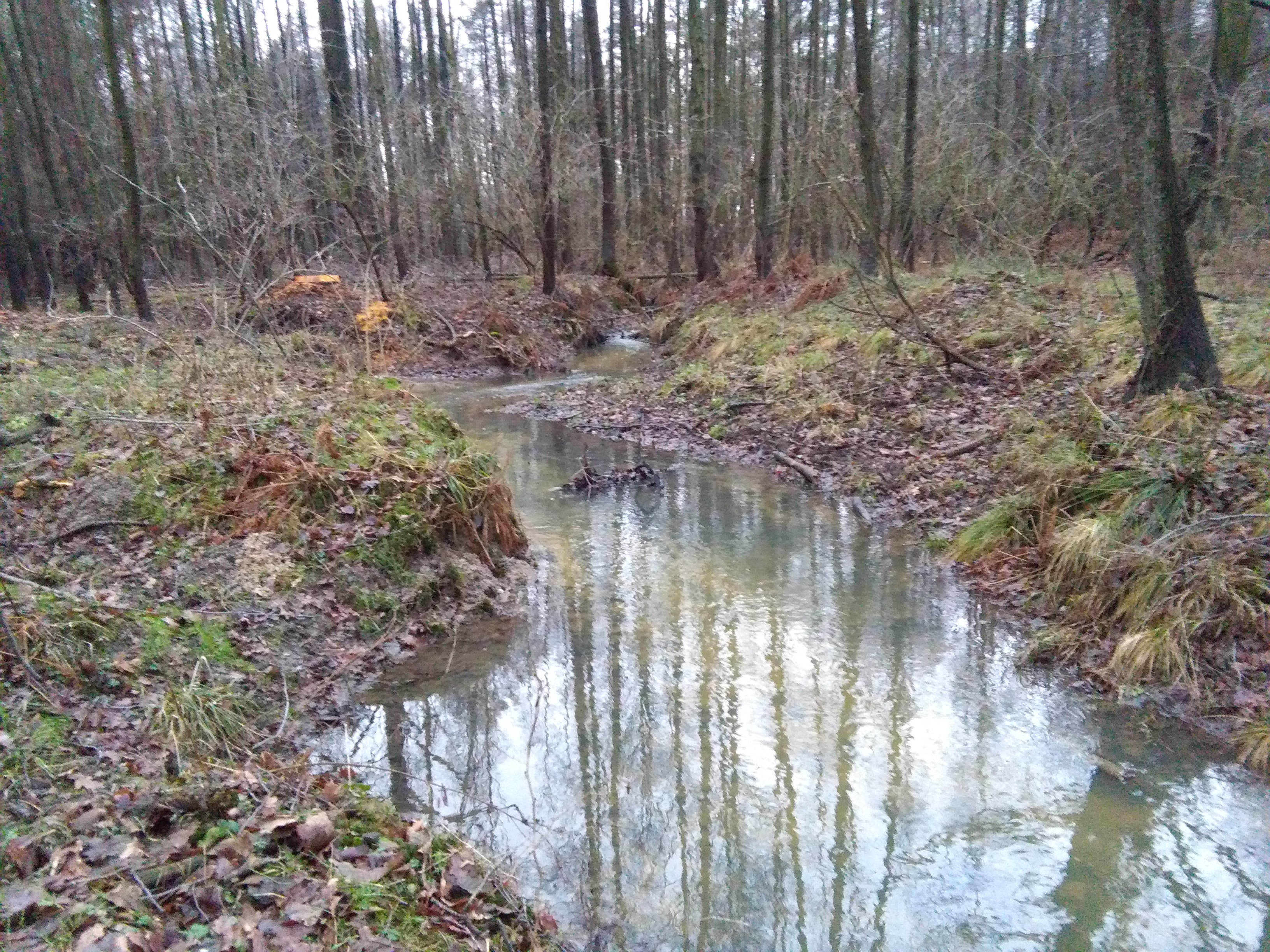 Struga Bielawka (dopływ Mlecznej) w lesie Gniotek